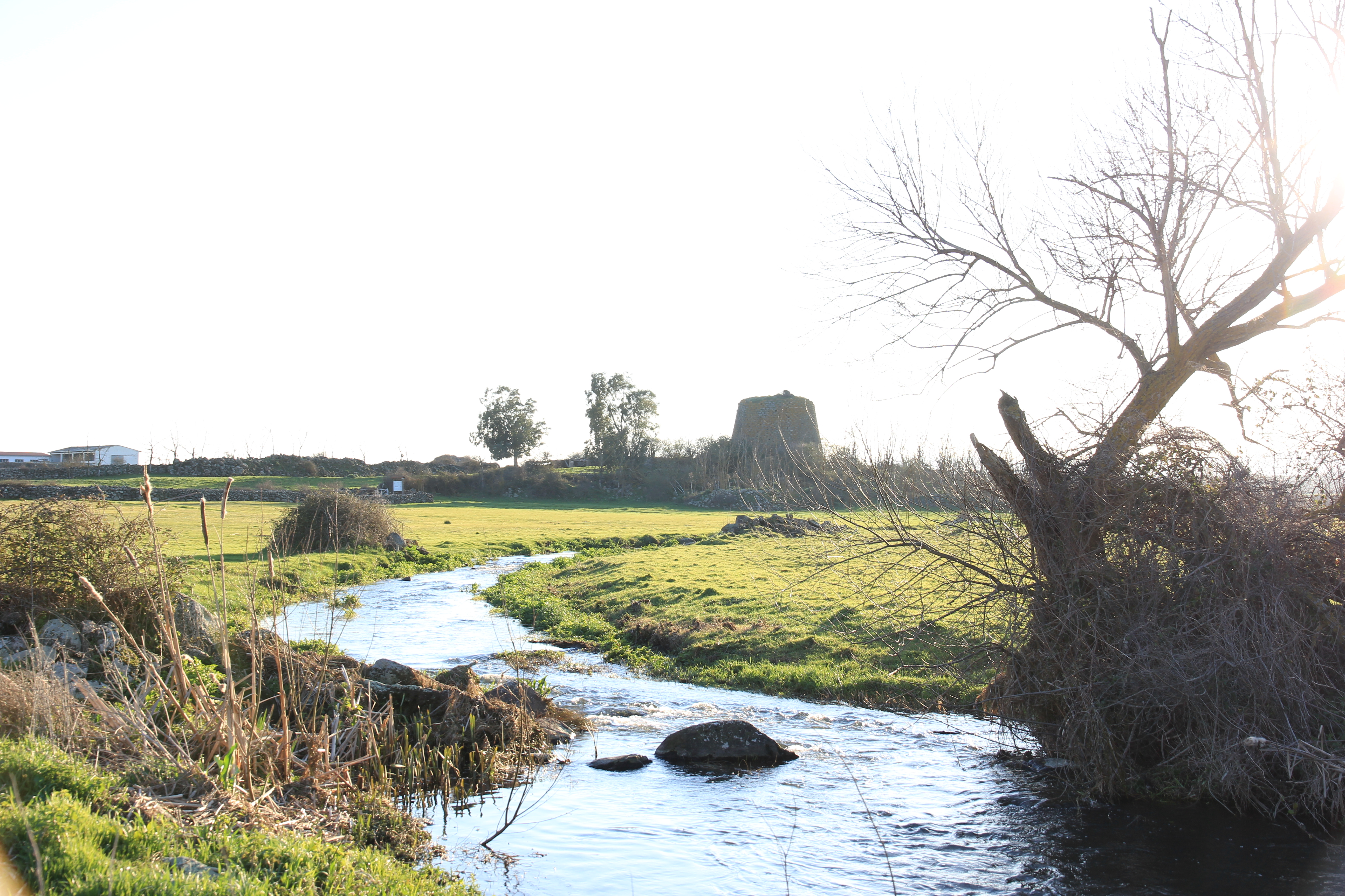 Birori - Nuraghe Sorolo